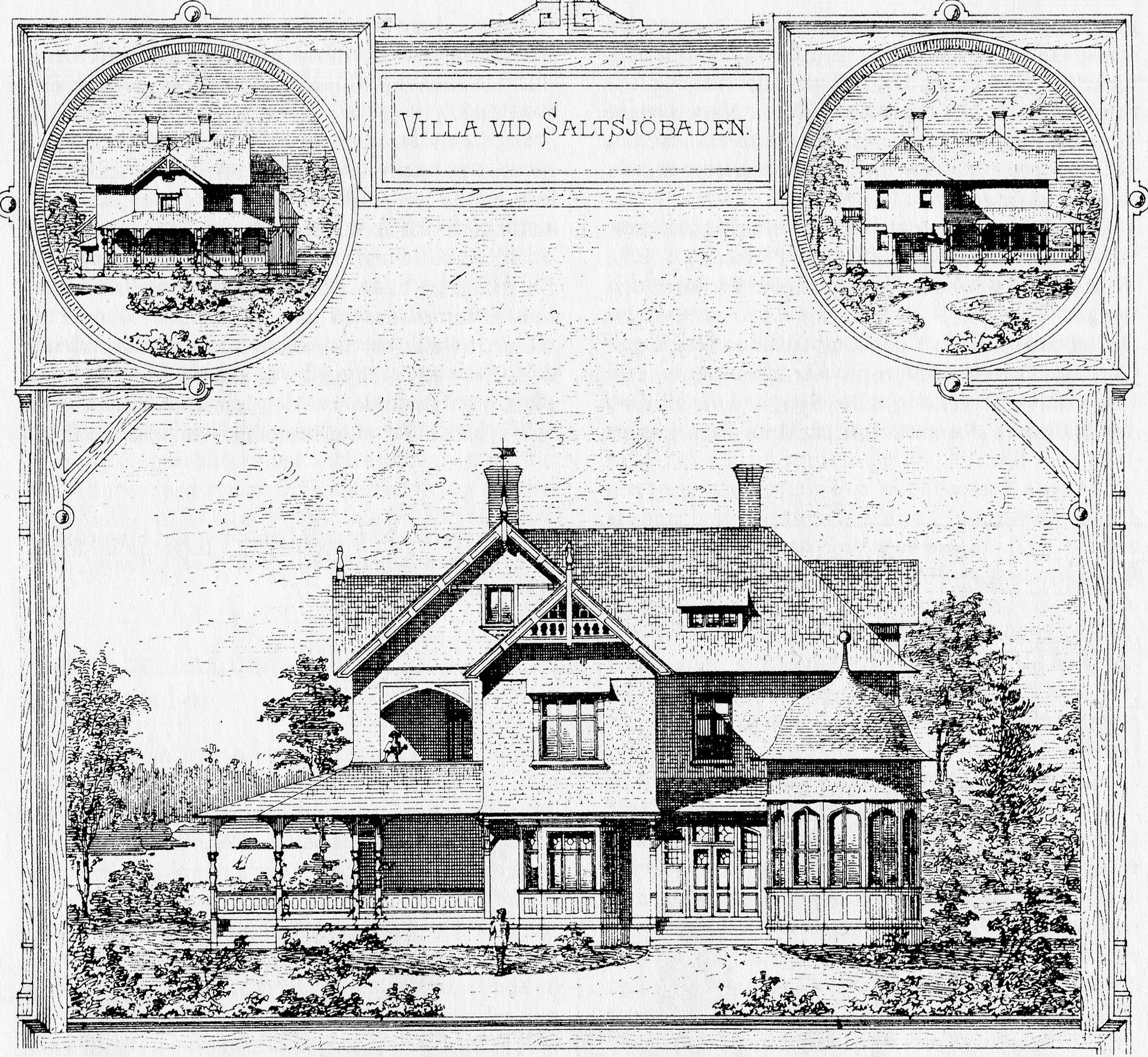 Ernest Thiels "Villa Bikupa" i Saltsjöbaden